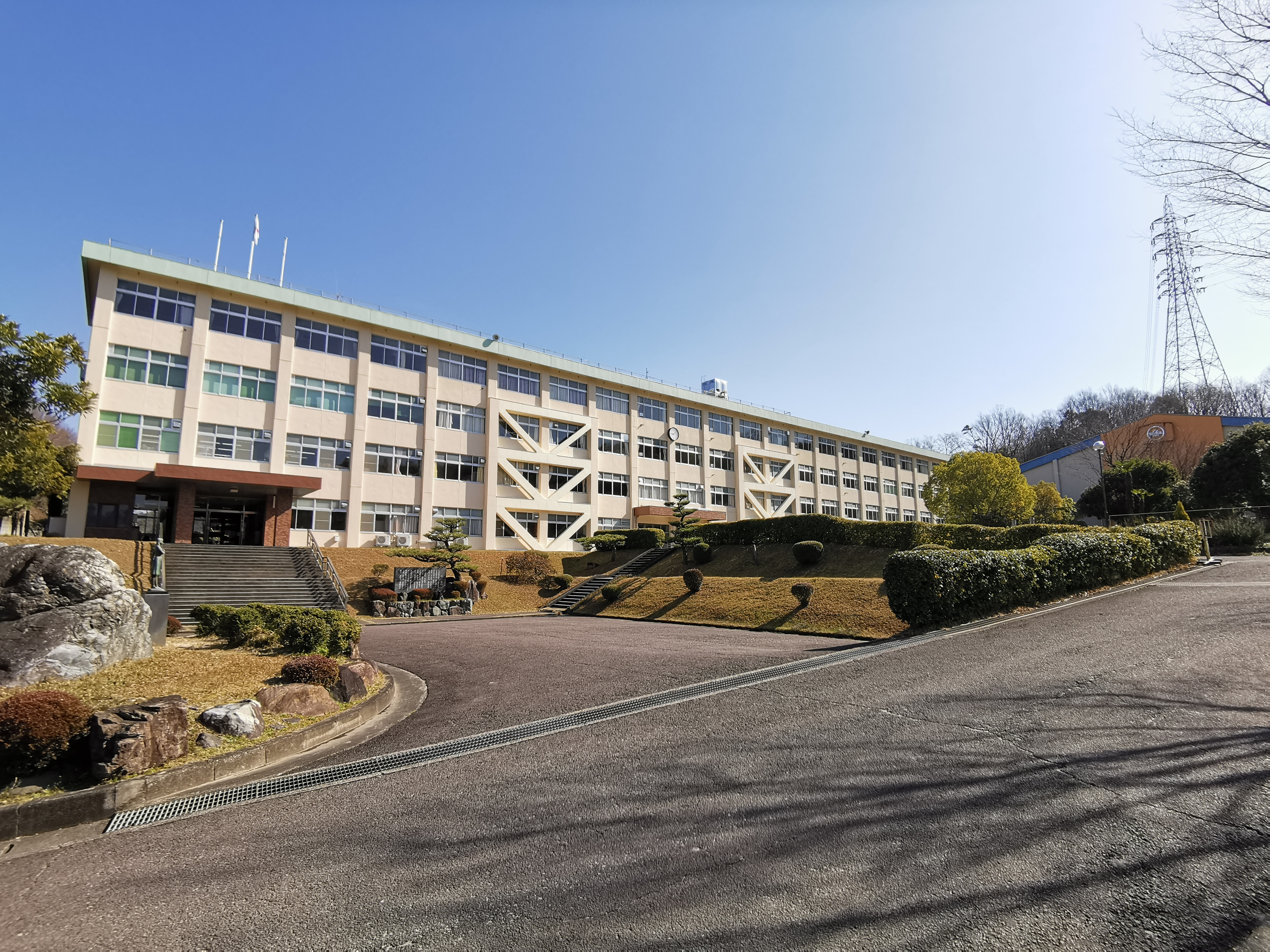 愛知県立犬山南高等学校